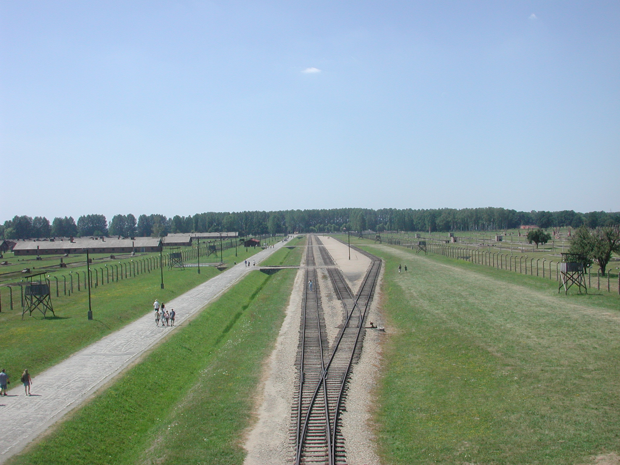 Die Aussicht vom Turm am Eingang in Auschwitz-Birkenau